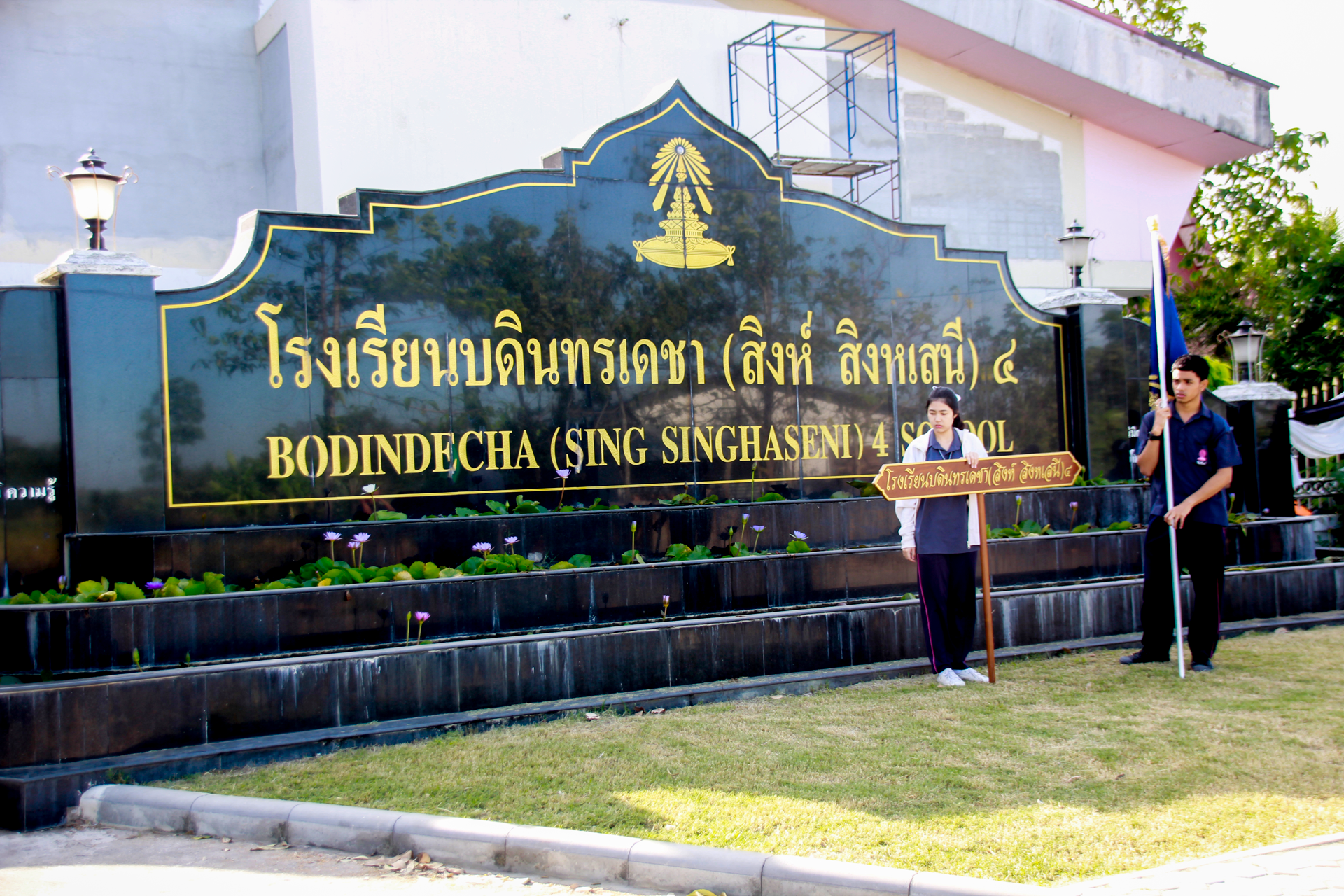 ป้ายบริเวญหน้าโรงเรียนบดินทรเดชา (สิงห์ สิงหเสนี) ๔